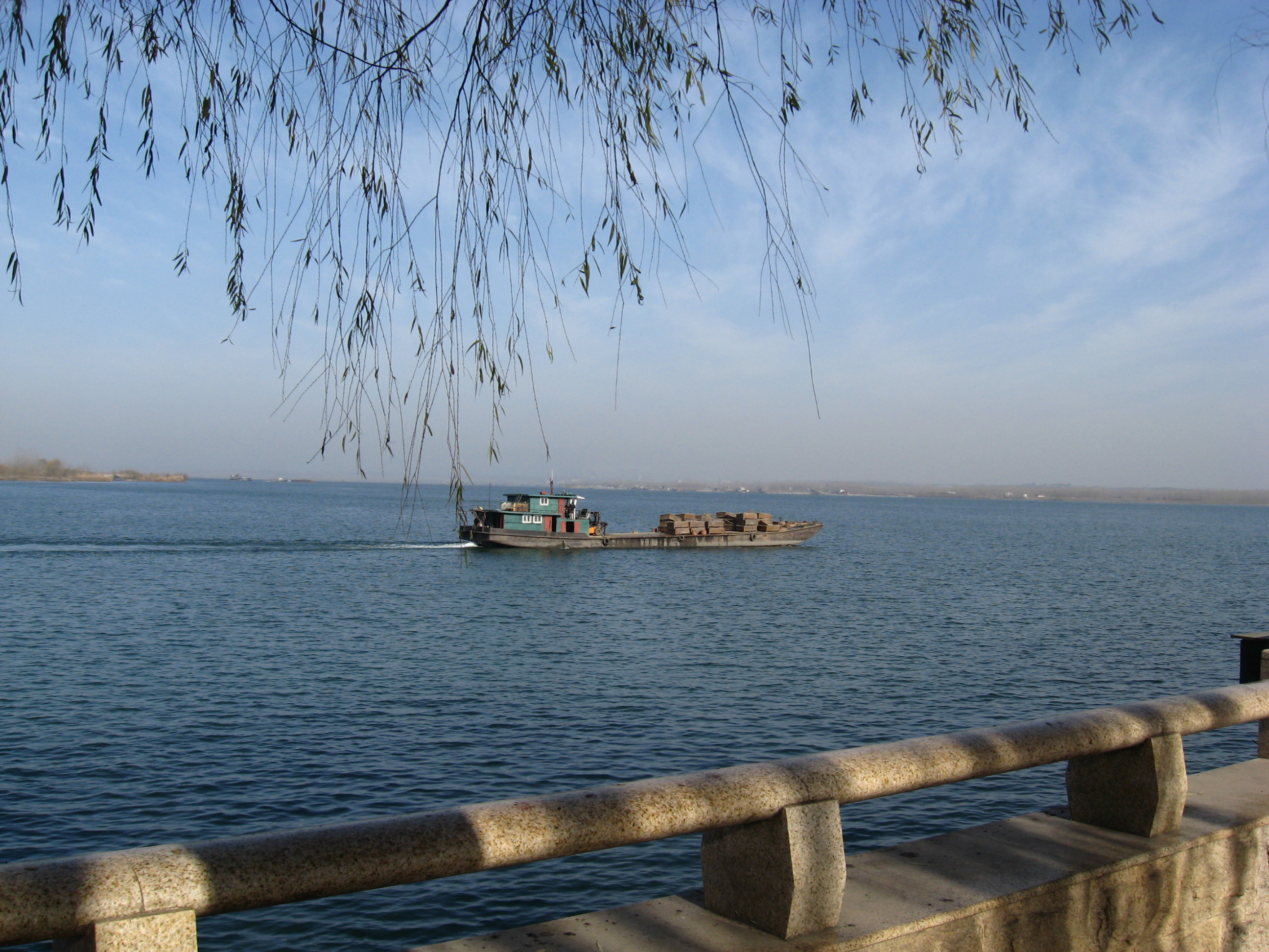 湖北老河口滨江公园